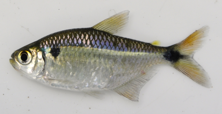 ejemplar de la cuenca del Río Negro, Uruguay